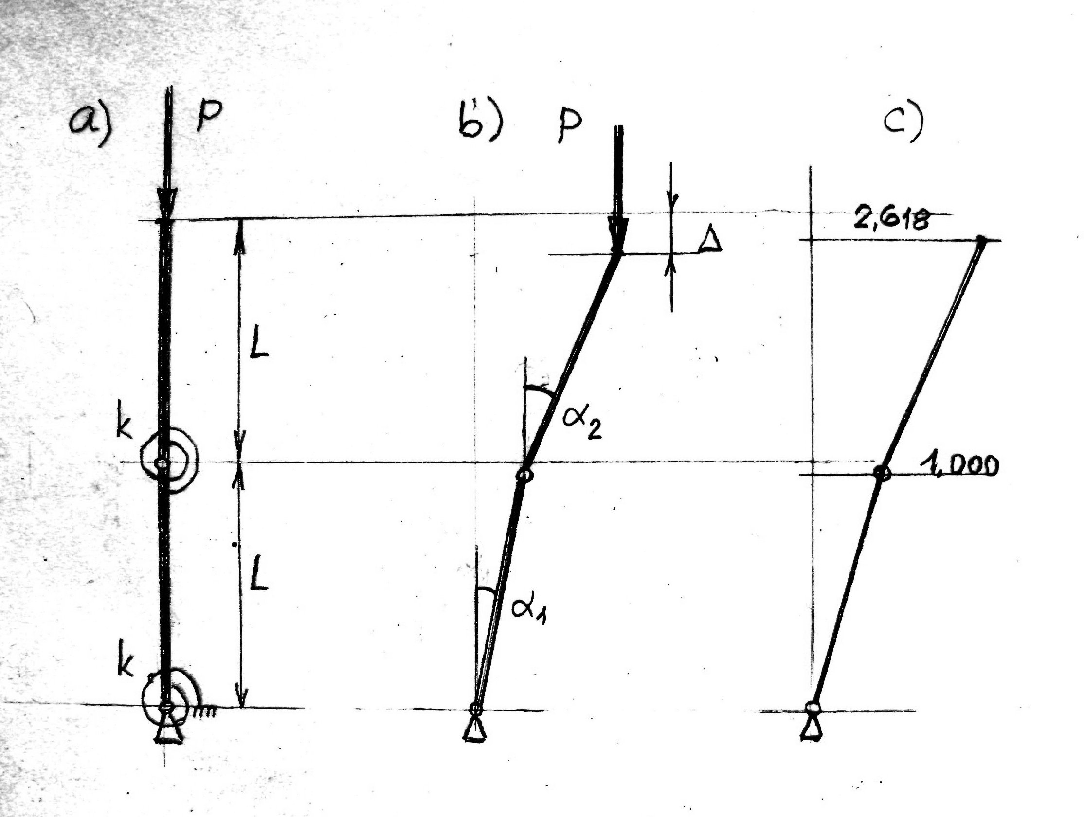 Analiza stateczności modelu pręta ściskanego